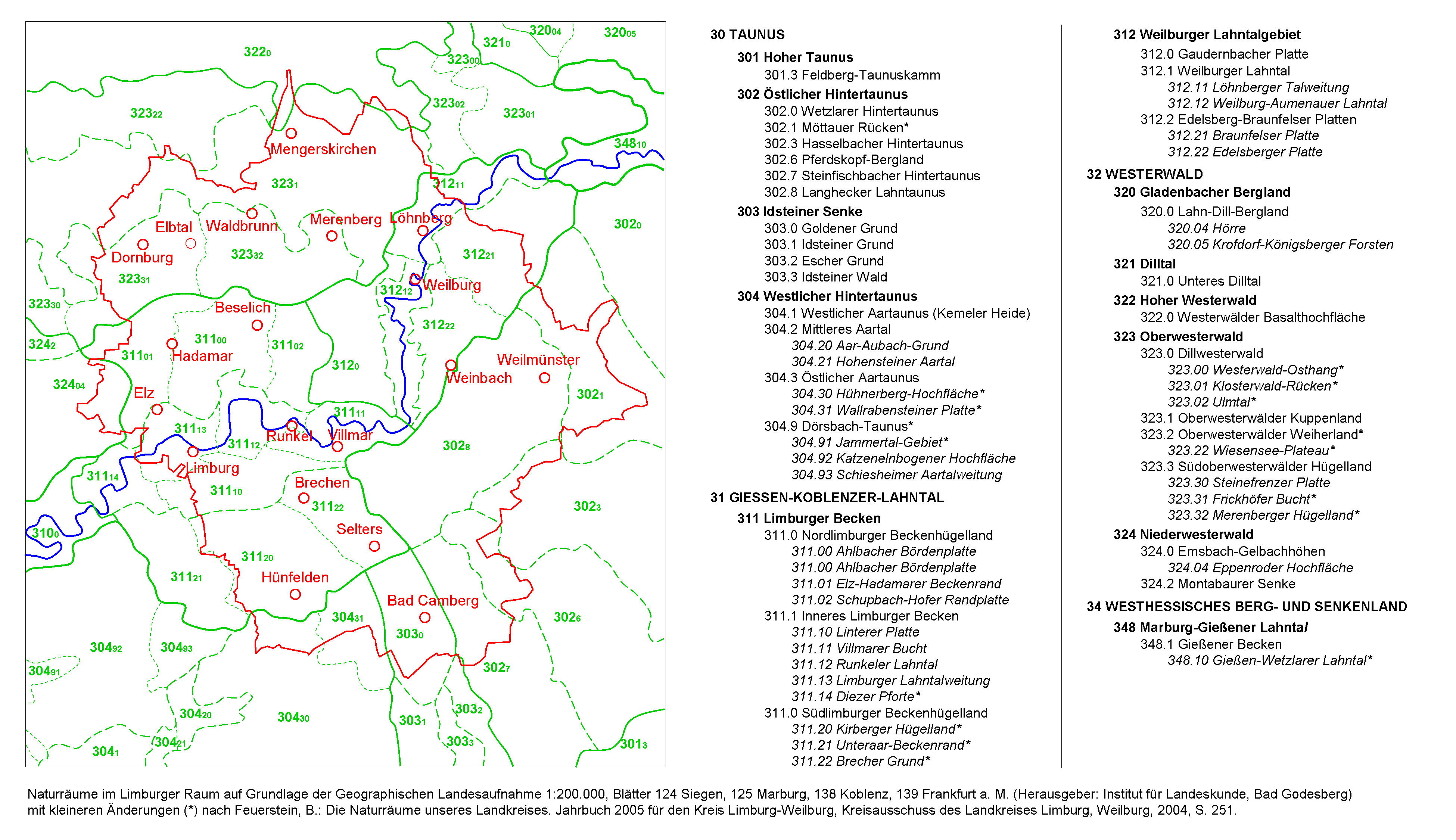 Naturräume im Limburger Raum, selbst erstellt nach Feuerstein, B.: Die Naturräume unseres Landkreises. Jahrbuch 2005 für den Kreis Limburg-Weilburg, Kreisausschuss des Landkreises Limburg, Weilburg, 2004, S. 251. Feldfrei at German Wikipedia ist Autor des zitierten Artikels. Weitere Literatur: Fischer, H.: Die naturräumlichen Einheiten auf Blatt 124 Siegen. - Bonn-Bad Godesberg, 1972. Müller-Miny, H. und M. Bürgener: Die naturräumlichen Einheiten auf Blatt 138 Koblenz. - Bonn-Bad Godesberg, 1971. Sandner, G.: Die naturräumlichen Einheiten auf Blatt 125 Marburg. - Bad Godesberg, 1960. Schwenzer, B.: Die naturräumlichen Einheiten auf Blatt 139 Frankfurt am Main. - Bad Godesberg, 1967.